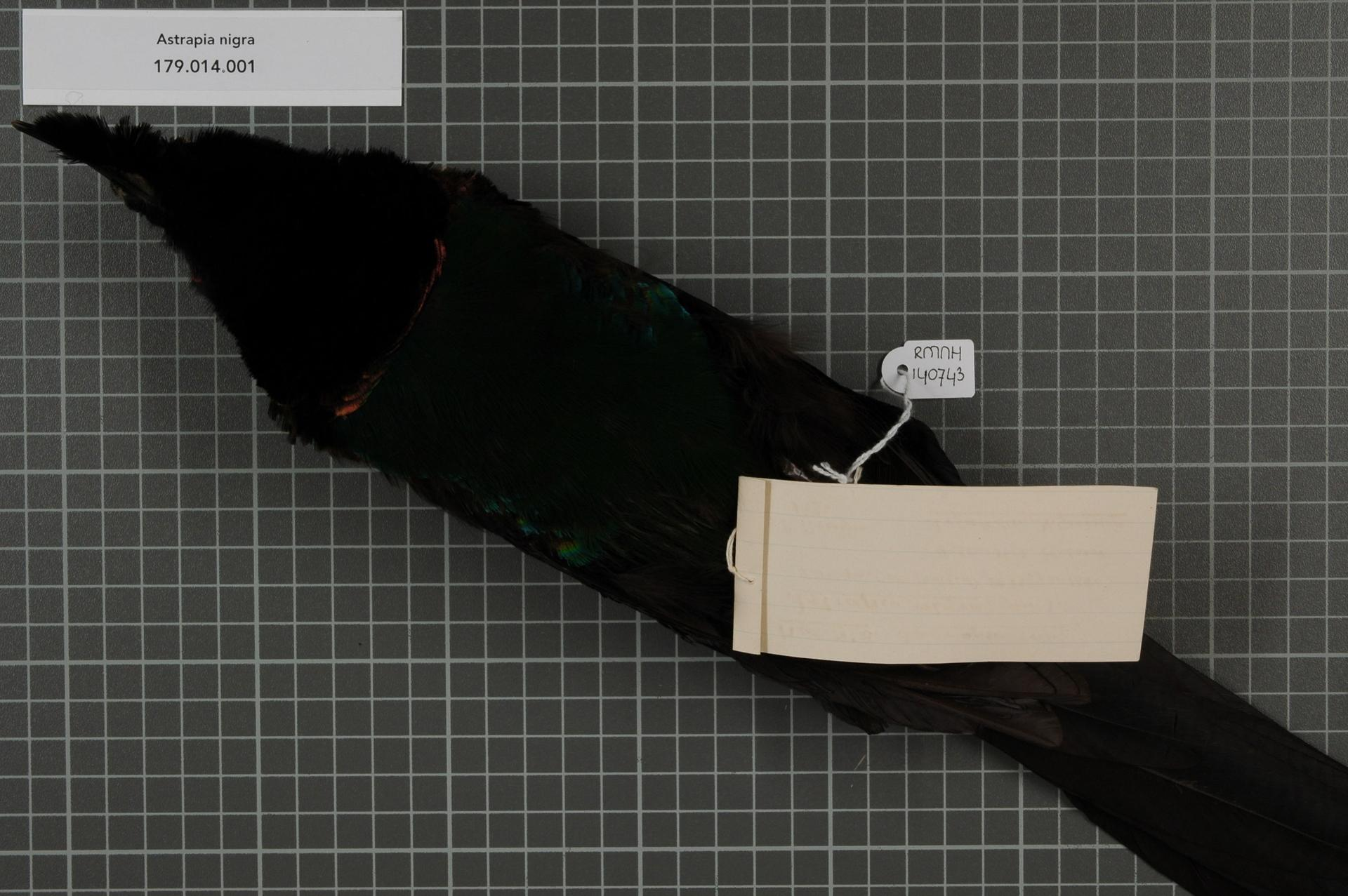 Astrapia nigra (Gmelin, 1788)